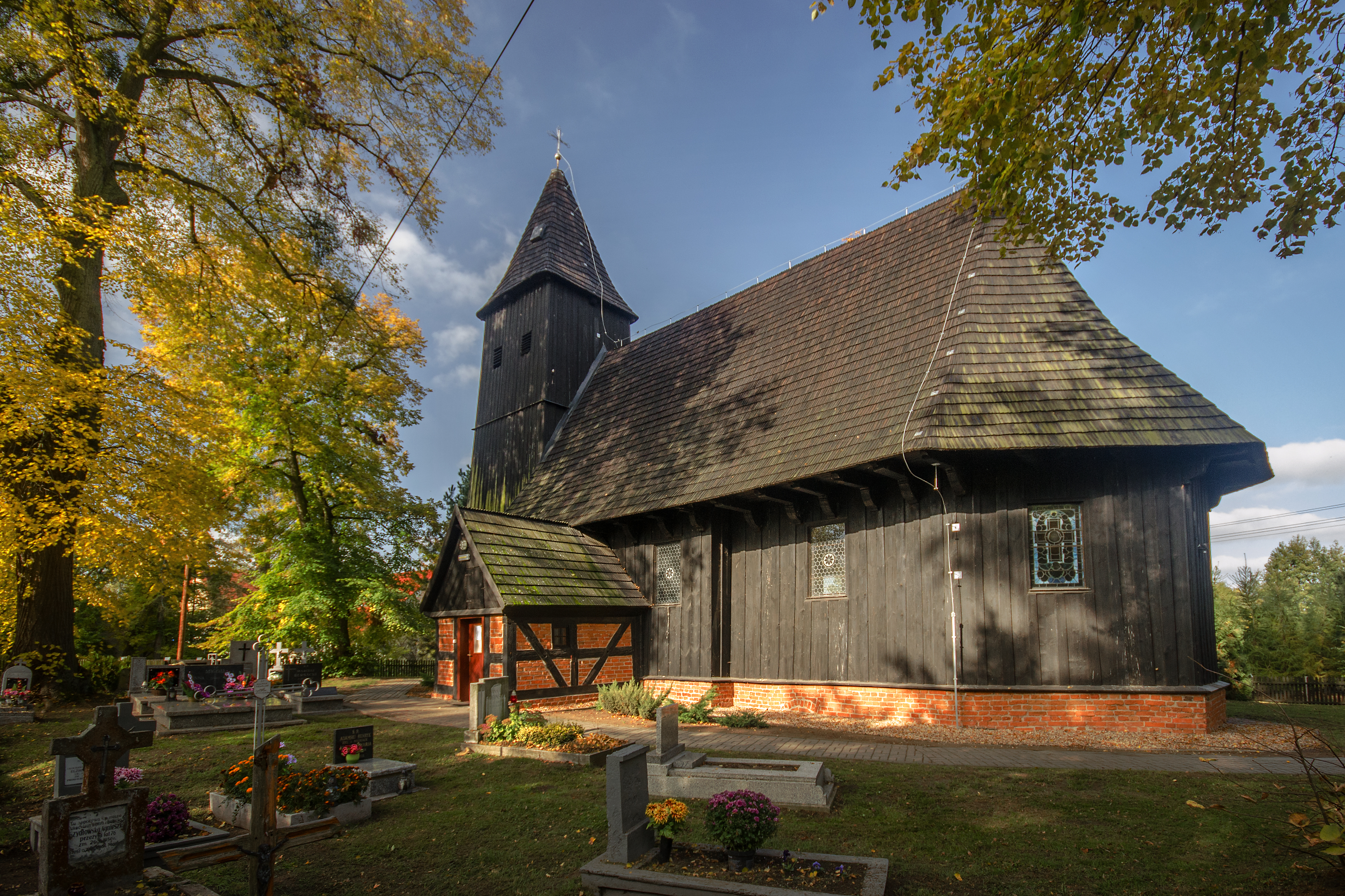 Woskowice Małe, kościół par. p.w. św. Wawrzyńca, 1711, 1818, 1840, 1914